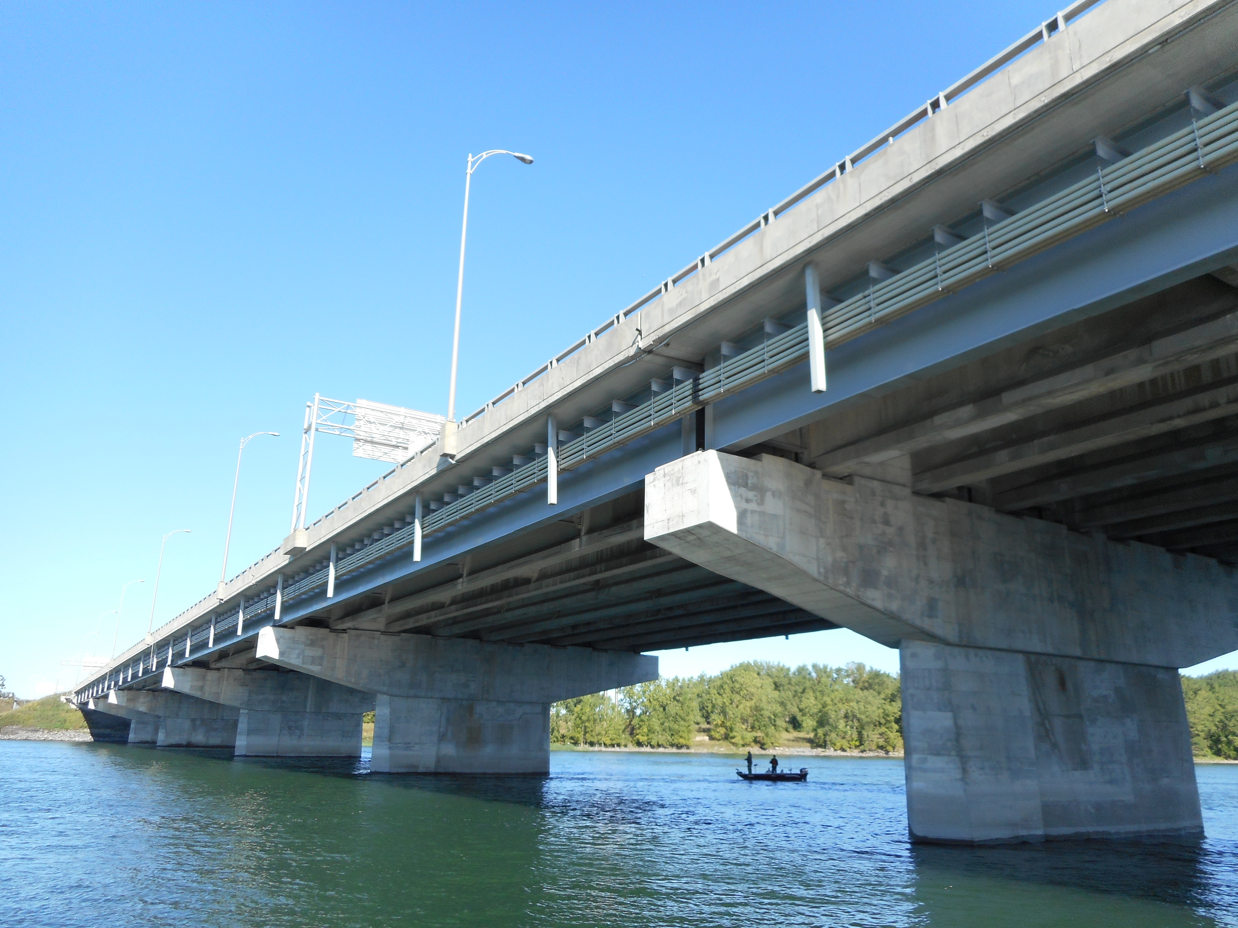 Le pont-tunnel Louis-Hippolyte-La Fontaine vu du bateau Navark Longueuil V